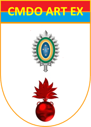 Distintivo aprovado pela SGEx, no BEx 02/15 de 09 JAN 15.